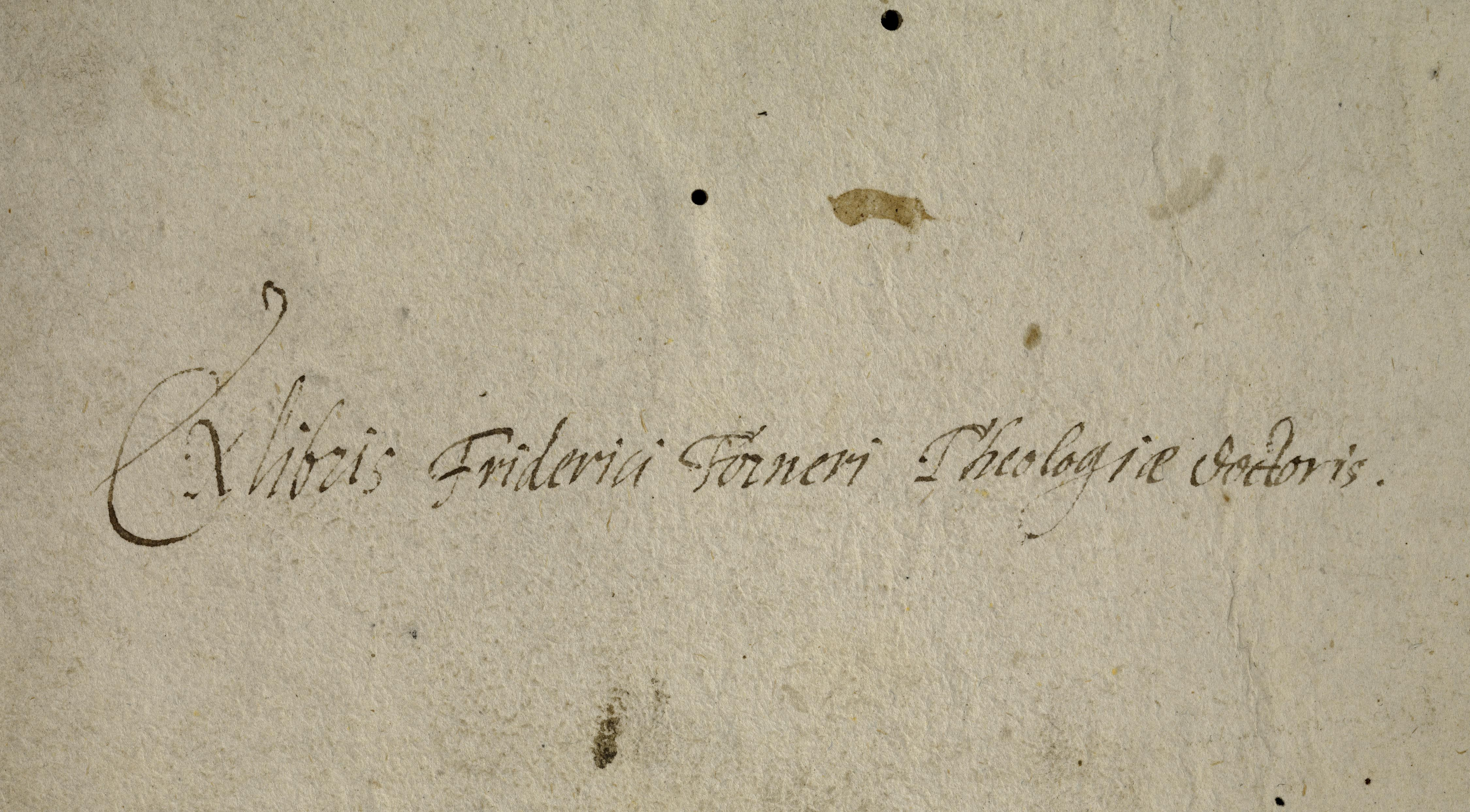 Besitzeintrag Friedrich Förner auf dem Spiegel des Sammelbands: (1) Jacobus de Clusa: Sermones dominicales. Speyer: Peter Drach, 1477. ISTC (2) Viola sanctorum. Basel: Bernhard Richel, 1474. ISTC Staatsbibliothek Bamberg, Signatur: Inc.typ.Q.XI.25